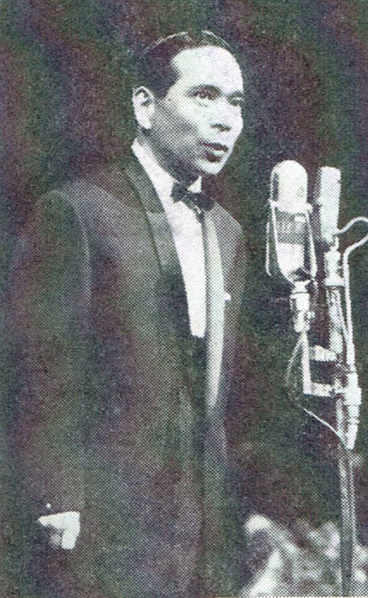 平凡出版『週刊平凡』第4巻第25号（1962）より吉田正